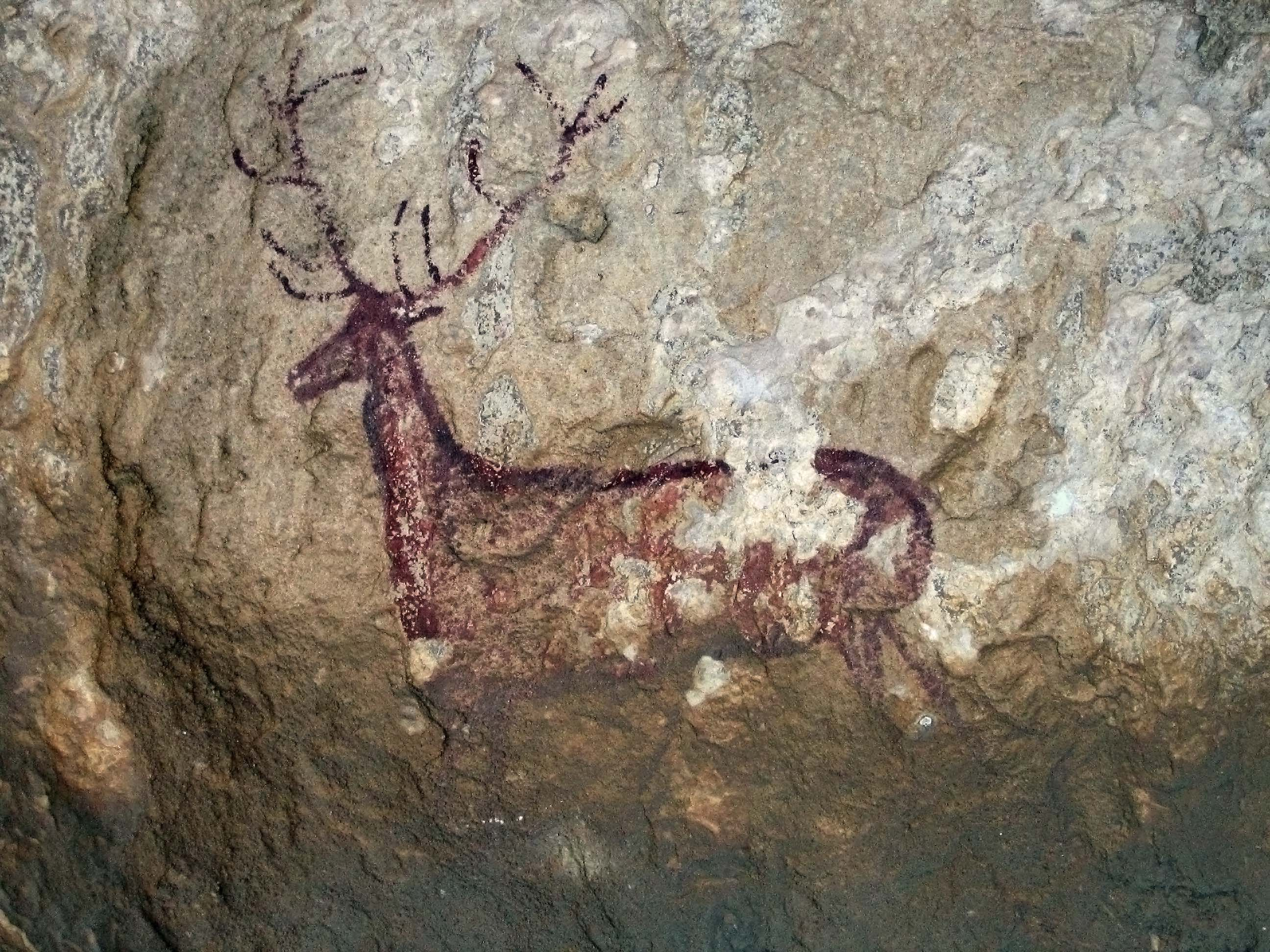 Ciervo rupestre, Arte levantino español, cc. 6000 adC. Abrigo de Chimiachas, en el Parque Natural de la Sierra y los Cañones de Guara (Huesca, España)